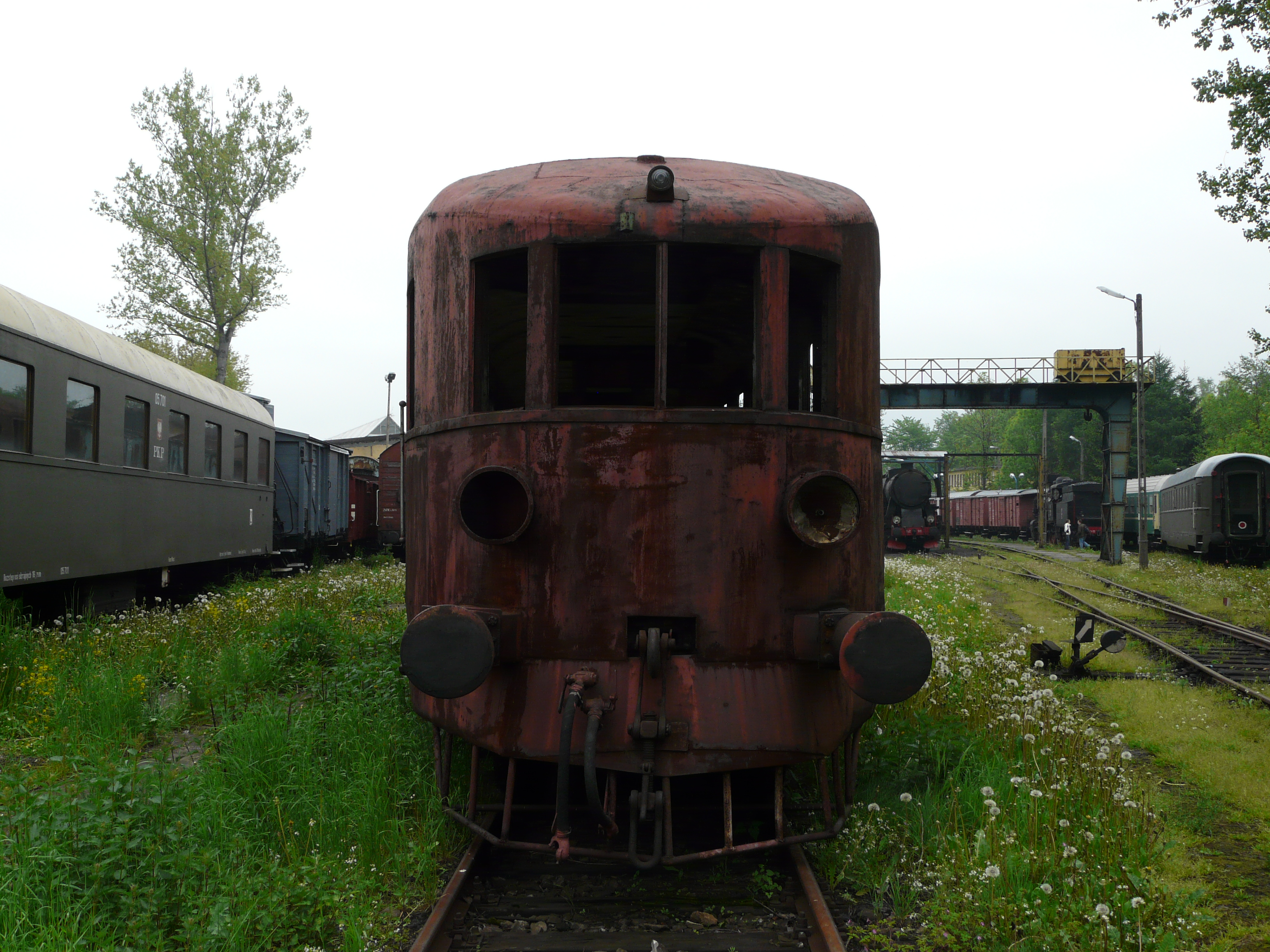 Skansen taboru kolejowego w Chabówce / Chabówka Rolling-Stock Heritage Park